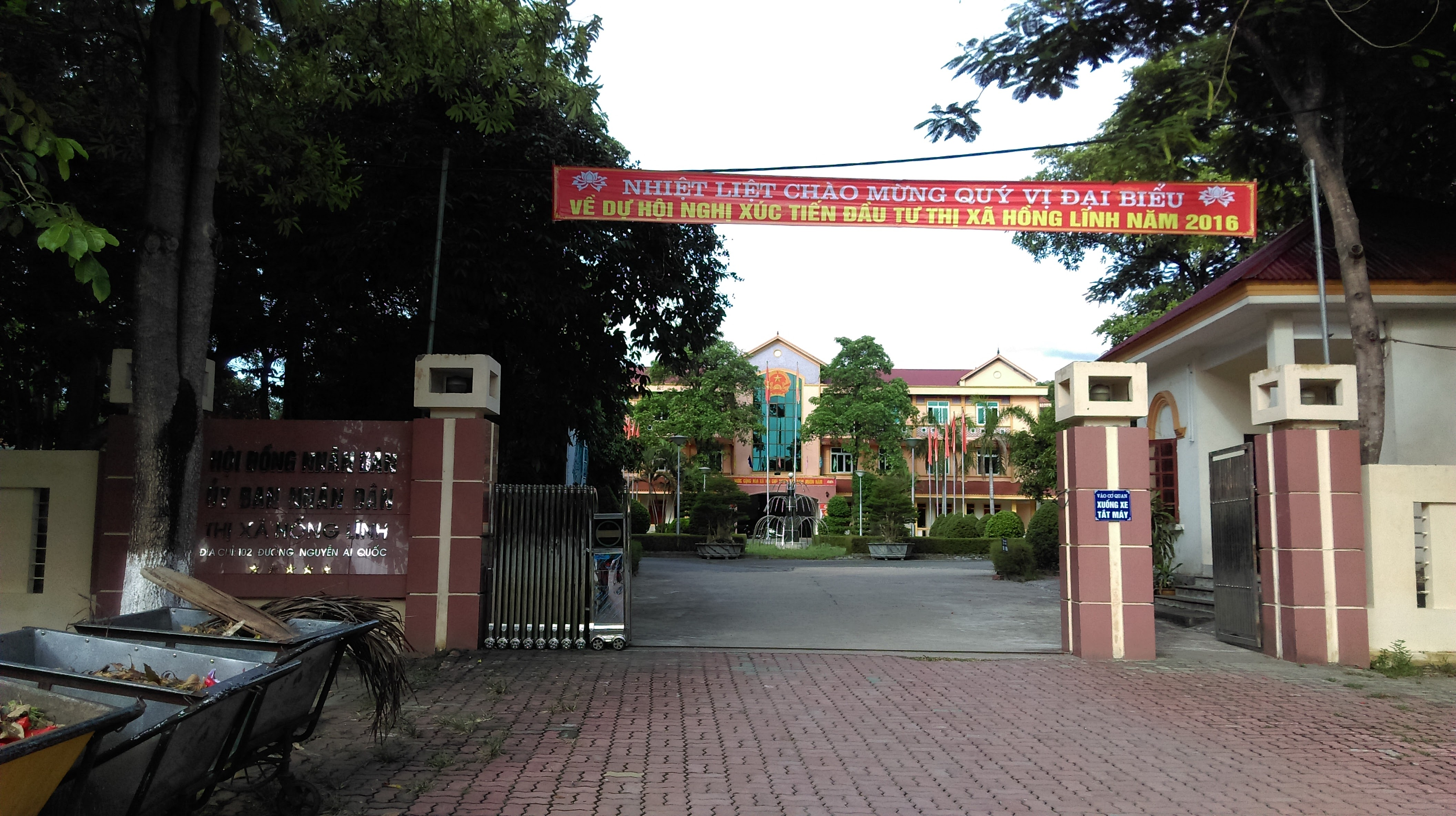 UBND thị xã Hồng Lĩnh, Hà Tĩnh